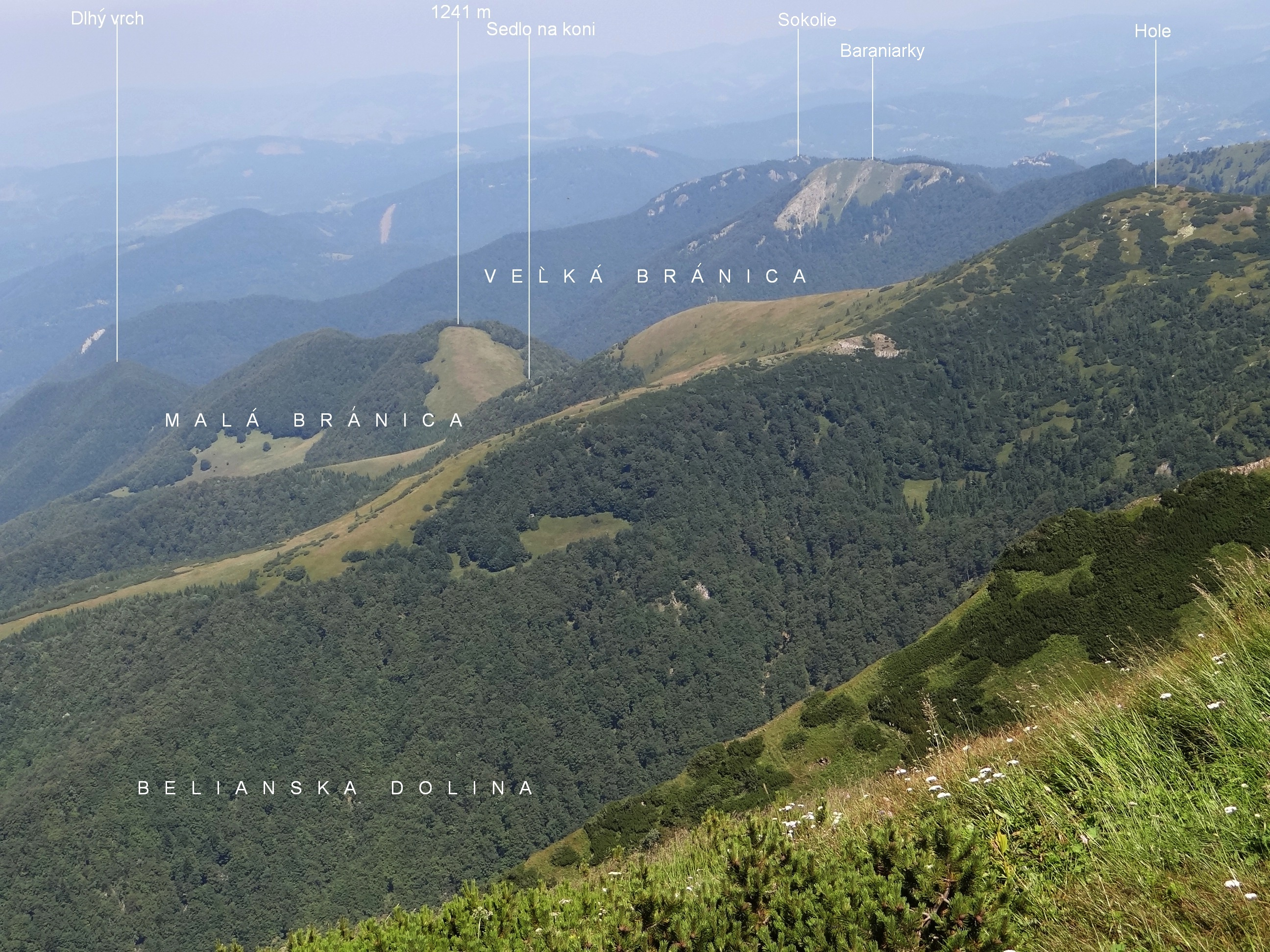 Belianská dolina